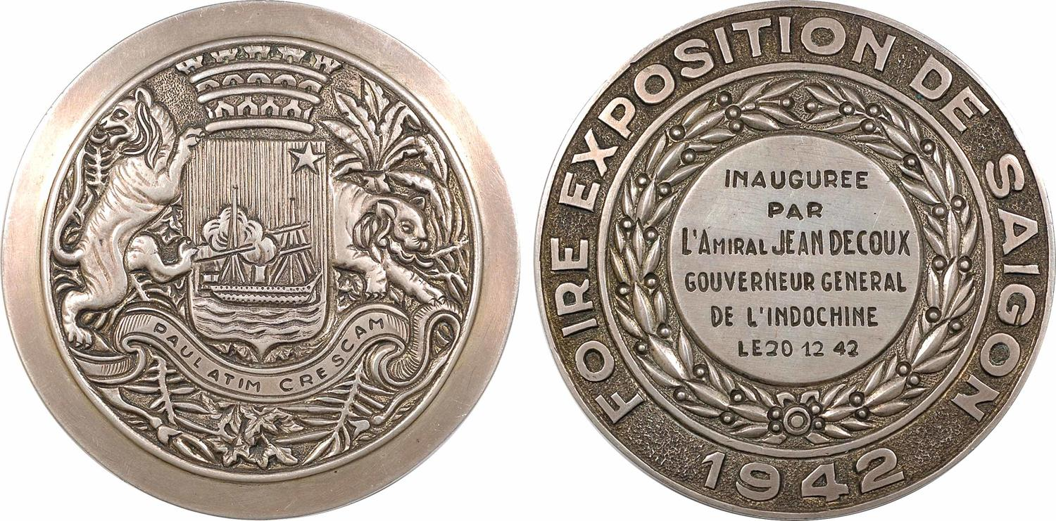 La Foire-Exposition de Saïgon (Cochinchine) eut lieu de décembre 1942 à février 1943. PAULATIM CRESCAM : Écu couronné, aux armes de Saïgon, et soutenu par deux tigres dans un décor de jungle. FOIRE EXPOSITION DE SAIGON 1942 : Cartouche gravé dans une couronne. Exemplaire en fonte d'argent, avec ciselures à la main. Attribution au centre : INAUGUREE/ PAR/ L'AMIRAL JEAN DECOUX/ GOUVERNEUR GENERAL/ DE L'INDOCHINE/ LE 20 12 42 qui rend cette médaille unique.